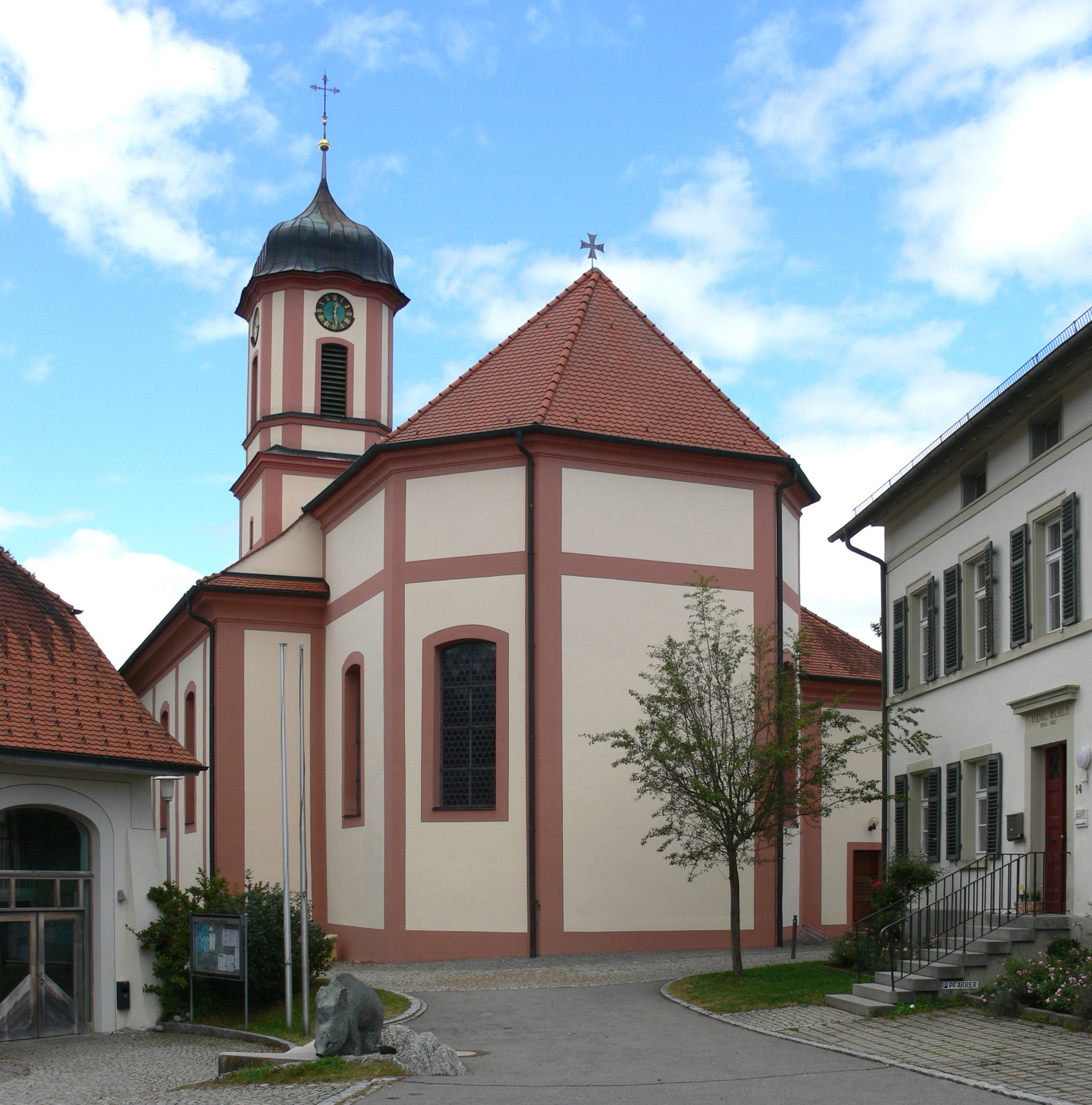 Kath. Pfarrkirche St. Michael, Ebersbach, Gemeinde Ebersbach-Musbach, Landkreis Ravensburg